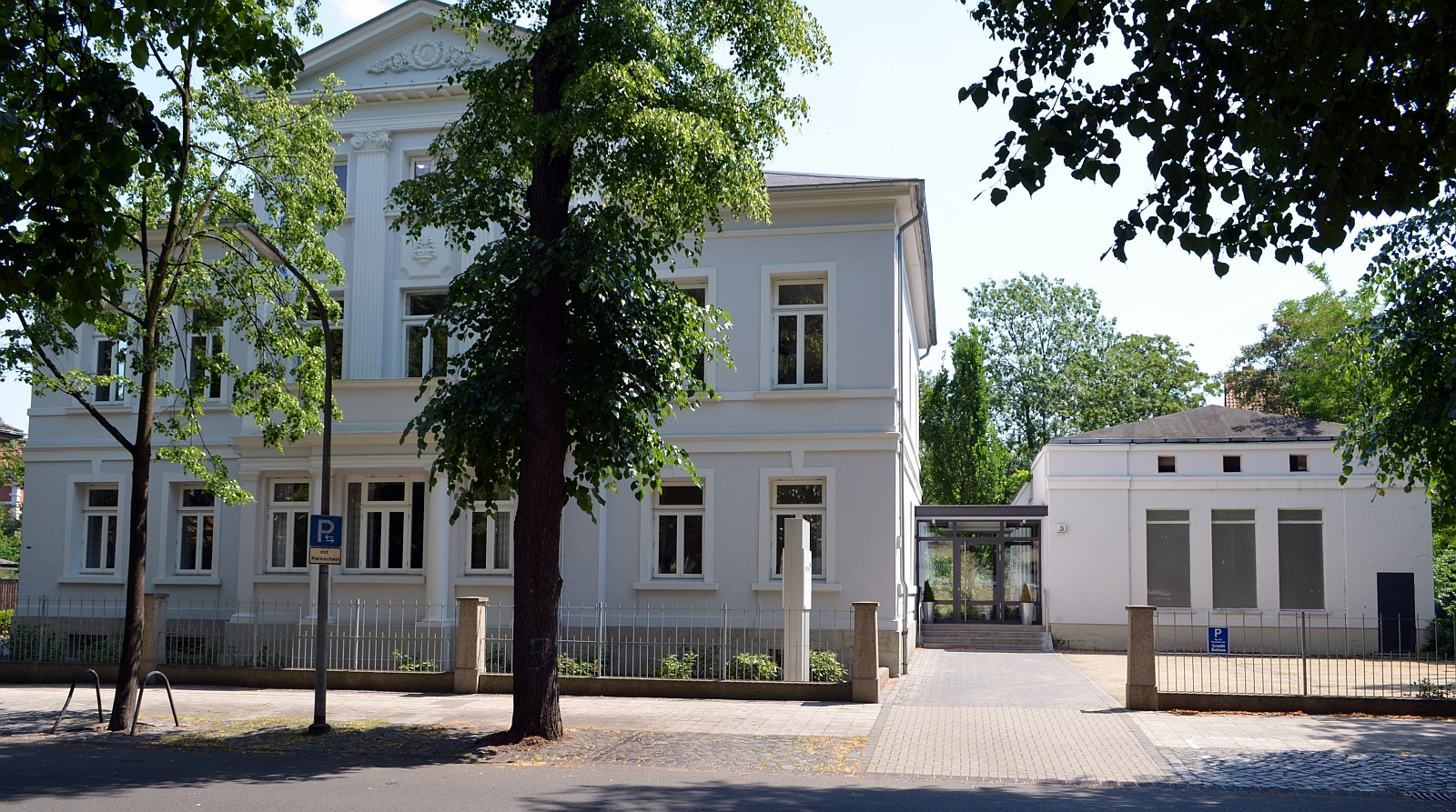 Braunschweig, Die Brücke (Straßenseite), Steintorwall 3, im Jahre 2011.